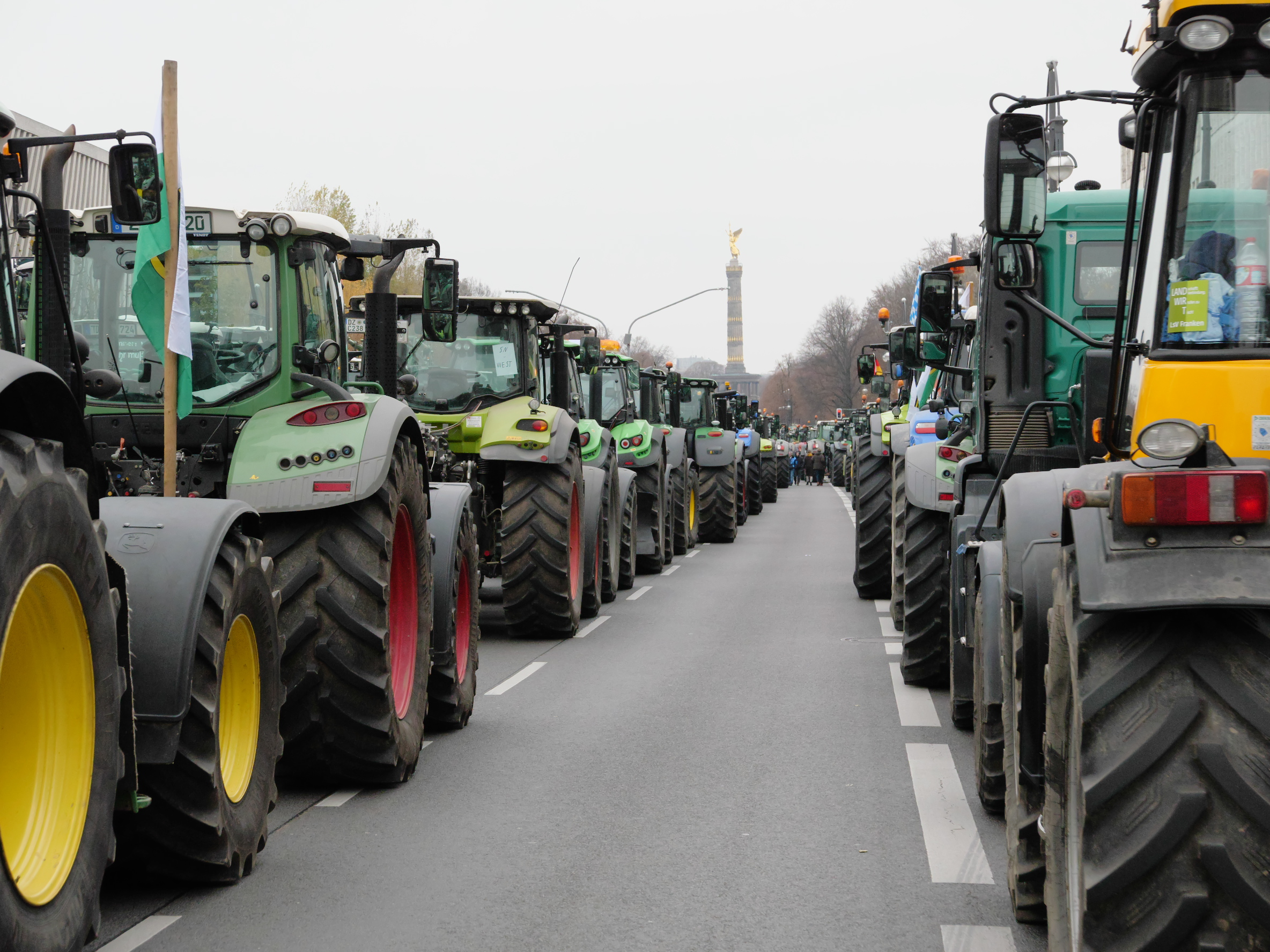 Auf der Klingelhöferstraße abgestellte Traktoren bei der Demonstration der deutschen Landwirte am 26. November 2019 in Berlin. Blick Richtung Großer Stern.